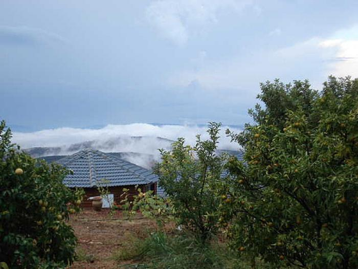 אמירים בגליל העליון. כל כך גבוה עד כי ישבנו בגובה העננים.